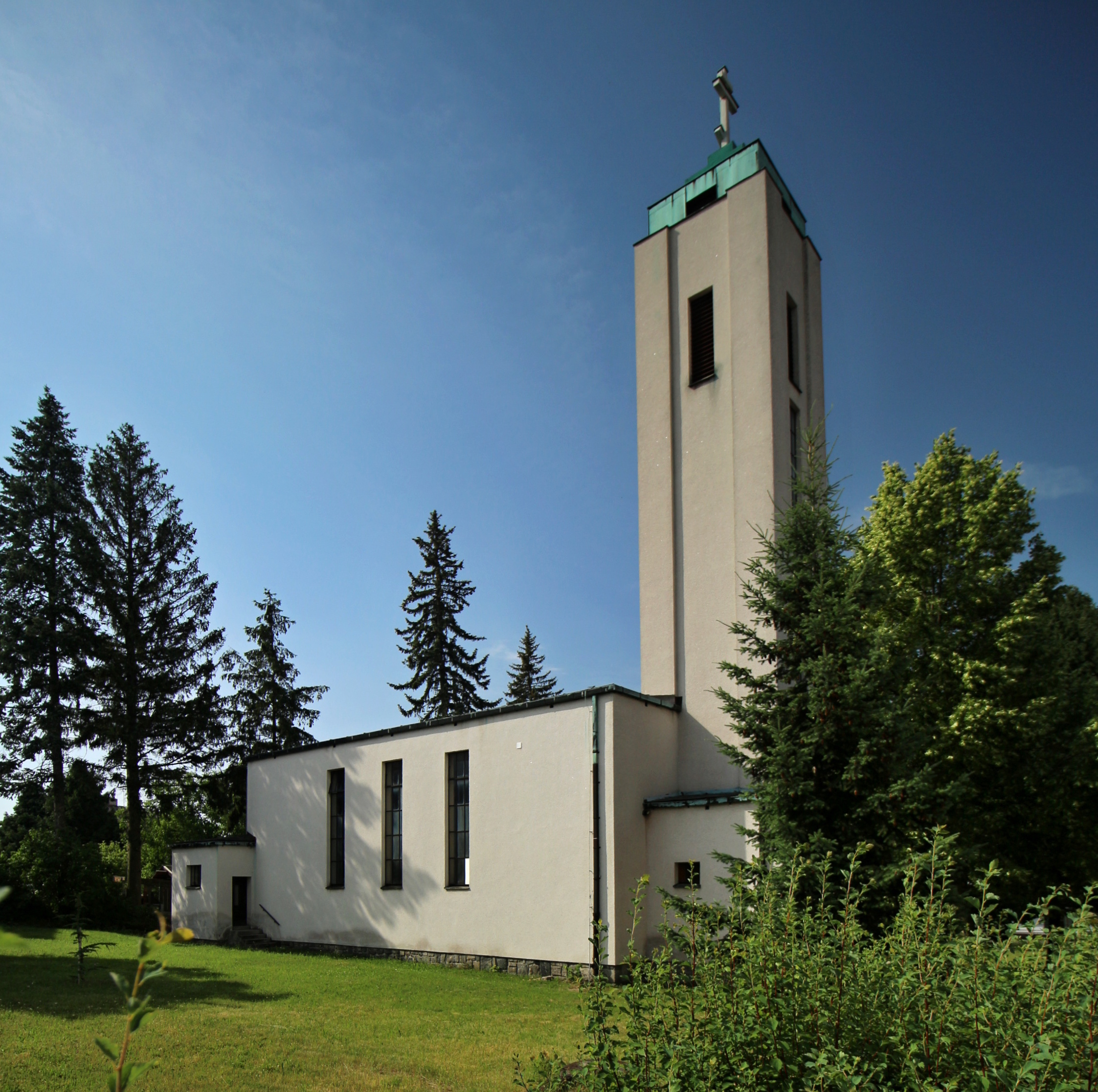 Příbram-Březové husitský sbor